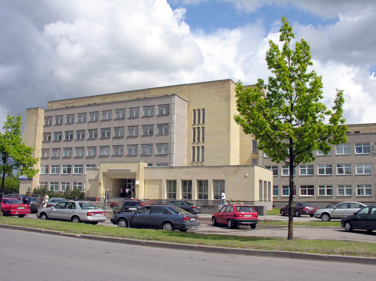 Mažeikių pirminės sveikatos priežiūros centras Foto: Algirdas, 2006 m. gegužės 30 d.